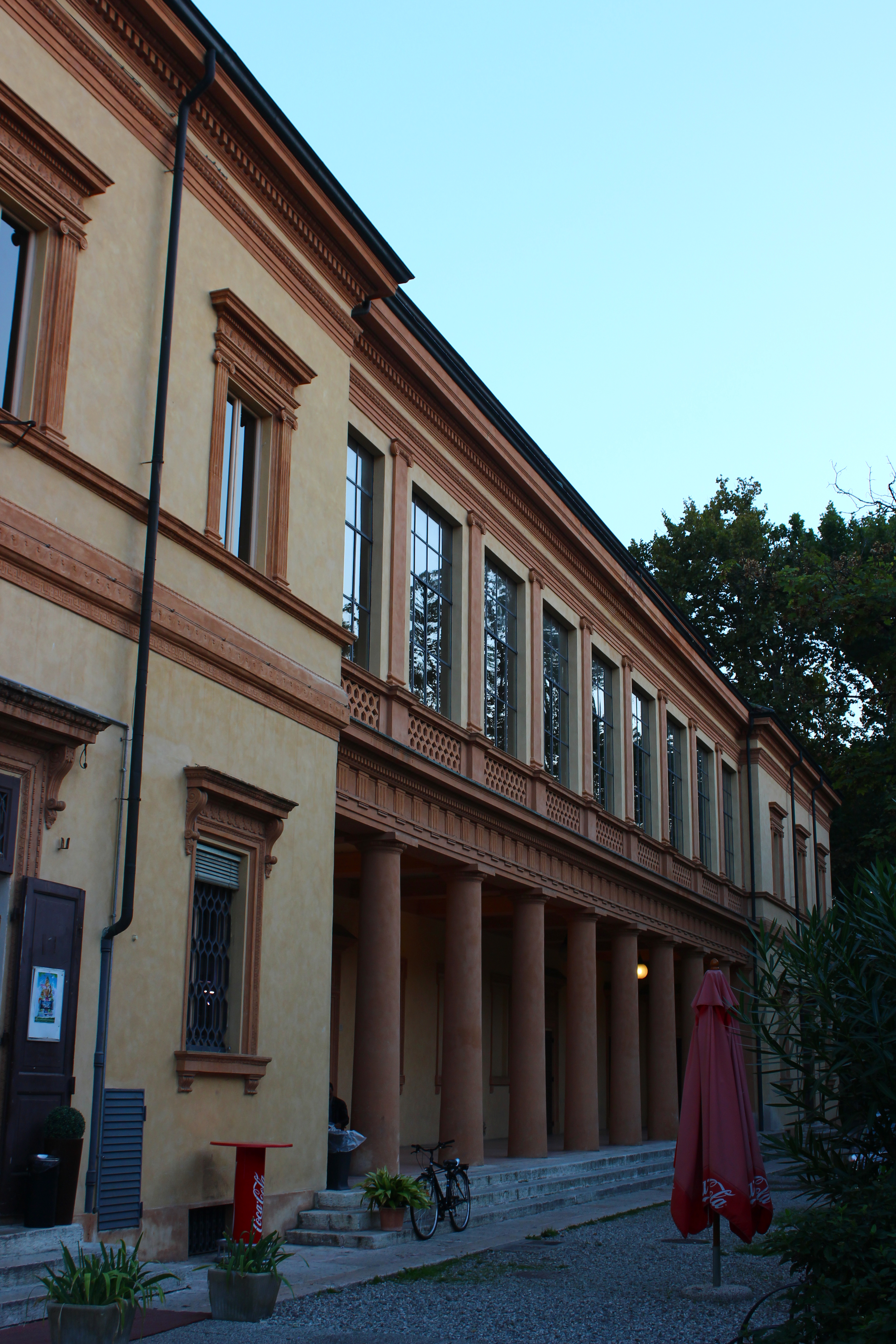 Teatro Storchi This is a photo of a monument which is part of cultural heritage of Italy.